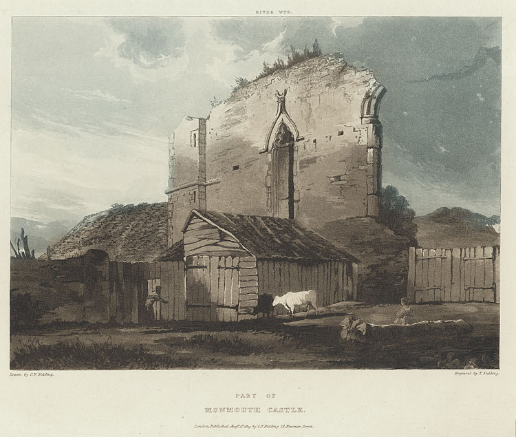 1 print : aquatint, col ; image size 154 x 214 mm., paper size 277 x 380 mm.